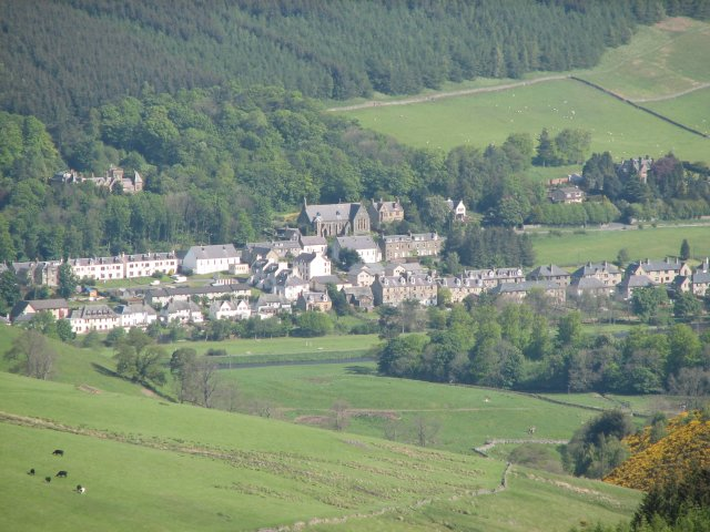 Walkerburn